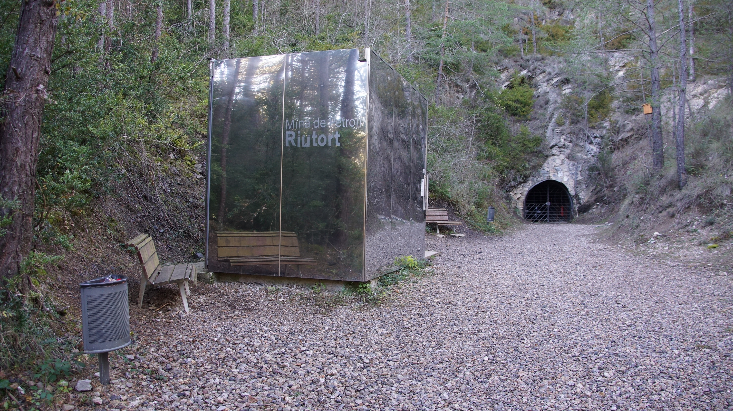 Mina de petroli de Riutort